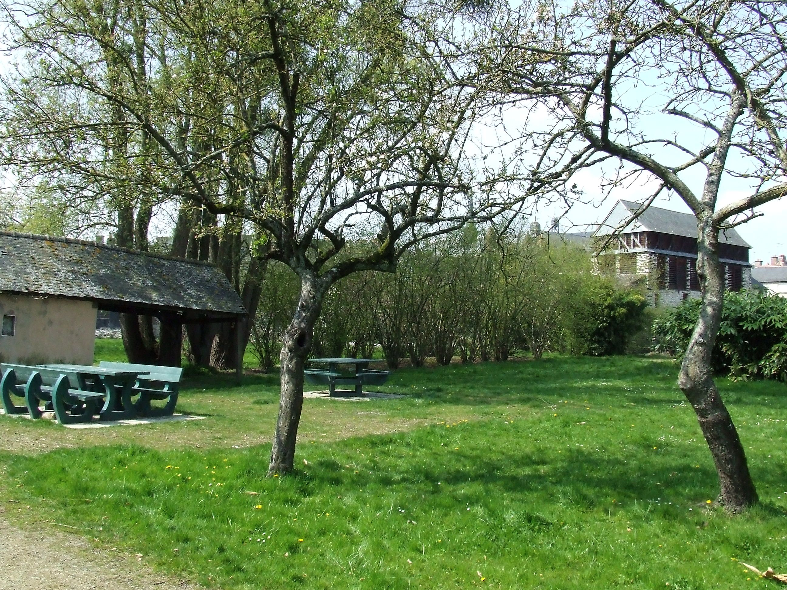 Jardin public